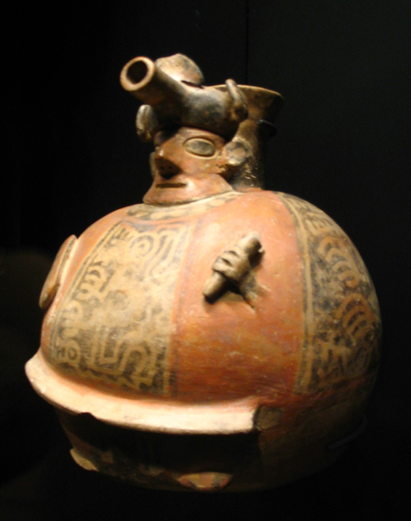 Céramique Recuay, Musée du Quai Branly, Paris.